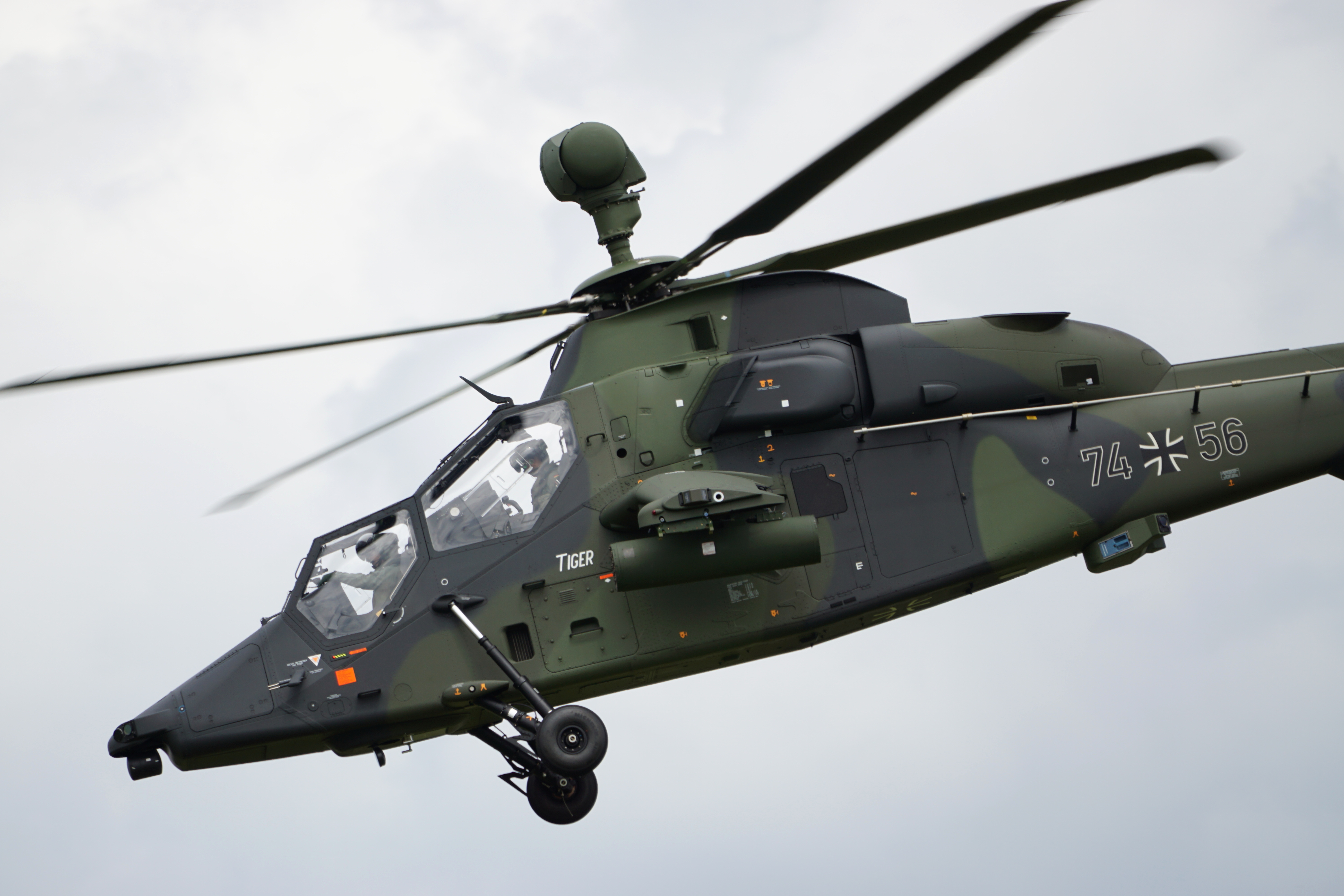 Aufgenommen am Tag der Bundeswehr 2017 auf dem Heeresflugplatz Faßberg.